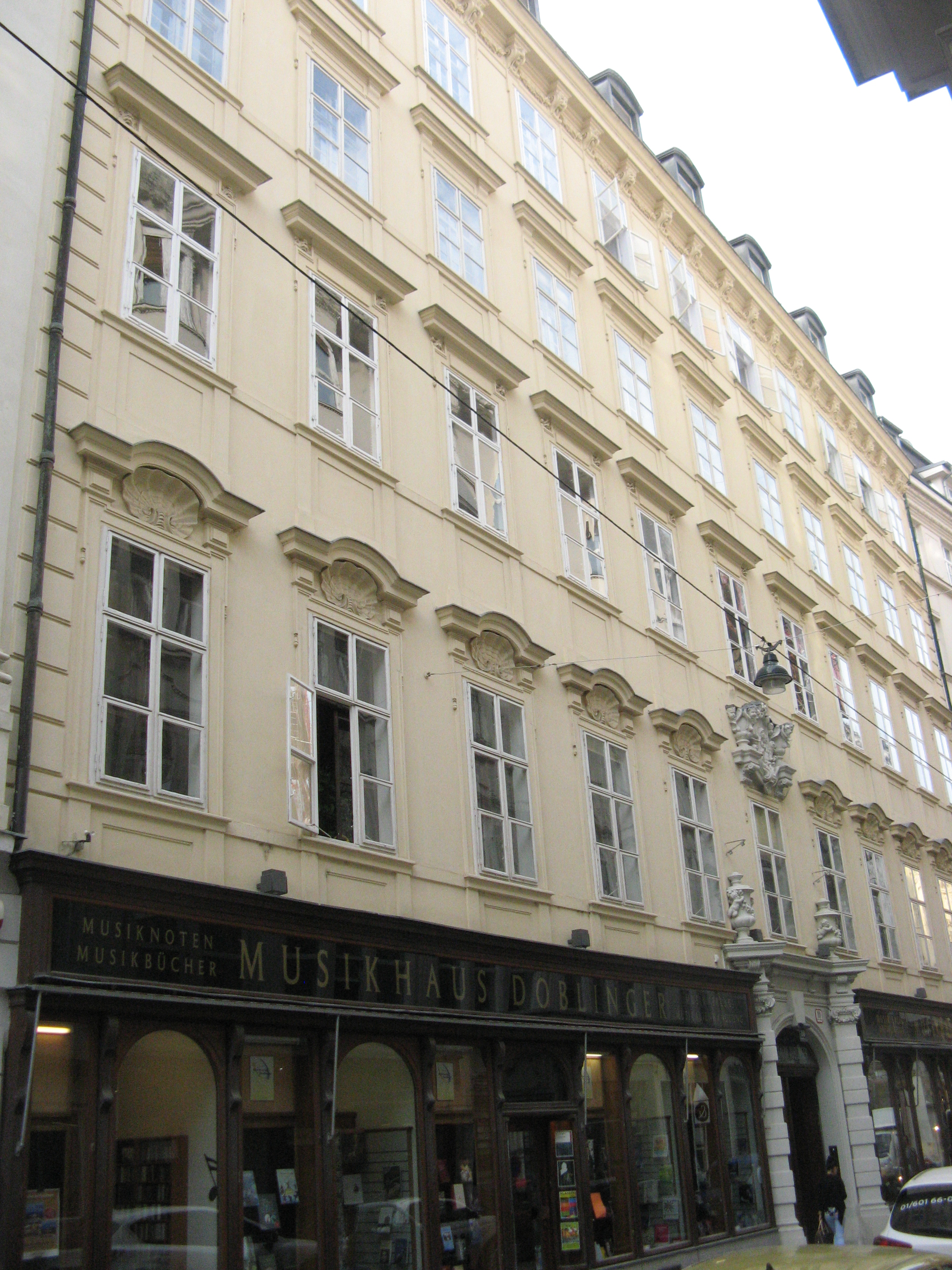 Palais Dietrichstein, Dorotheergasse 10, Wien-Innere Stadt